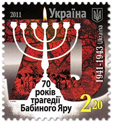 Художня поштова марка «70 років трагедії Бабиного Яру» (№ 1131). Формат марки – 33х30 мм. Перфорація гребінчаста – 13 1/4. Номінал марки – 2,20 грн. Кількість марок в аркуші – 16 (4х4). Тираж марки – 150 000 примірників. Захист марки: в УФ-променях світяться зображення менори та цифри «1941-1943»; мікротекст: «В. Бариба». Текст на полях аркуша: «70 років трагедії Бабиного Яру», «29 вересня 1941 року – початок масових розстрілів євреїв у Бабиному Яру», «1941-1943». Художник марки та штемпеля Віктор Бариба. Марка – багатоколірна; спосіб друку – офсет. На полях маркового аркуша надруковано штриховий код 4823027131719. Зам. 1-3426. 31.08.2011. Марку надруковано на ДП «Поліграфічний комбінат «Україна» по виготовленню цінних паперів».